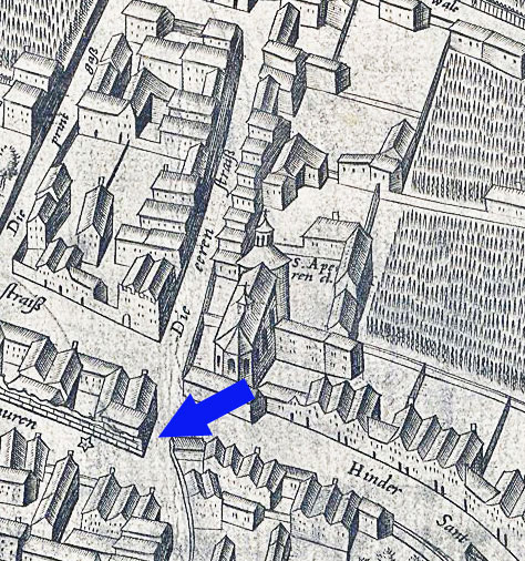 Ausschnitt des Mercator - Stadtplanes, Bereich Ehrenstraße/ St. Apern